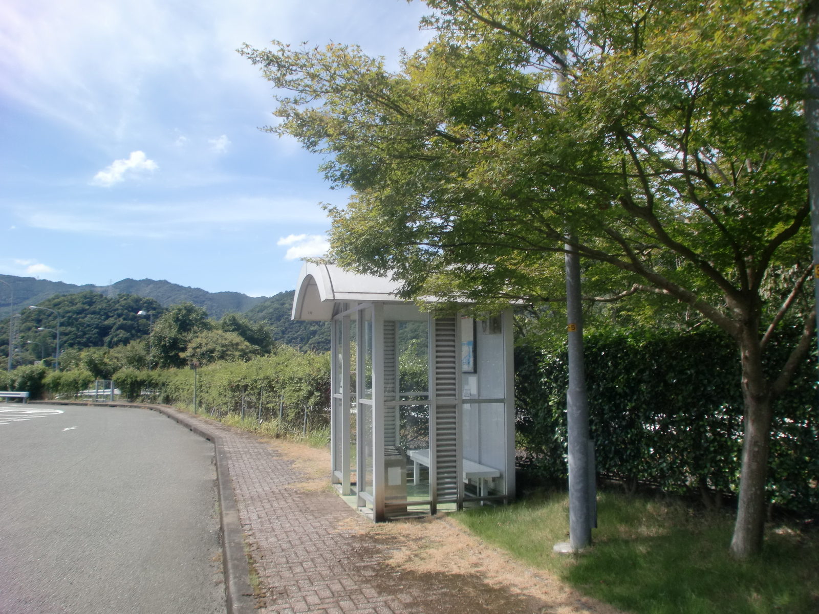 坂本パーキングエリア内にある坂本バスストップ（下り線）の外観